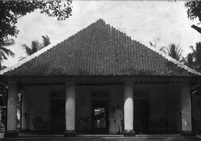 Foto. Echtpaar op de voorgalerij van hun huis in Kedong - Kebo